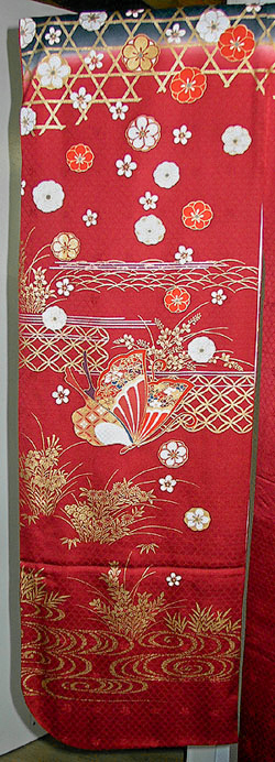 Manche gauche d'un kimono de type furisode (manches longues, de jeune fille non mariée) Catégorie:Vêtement japonais